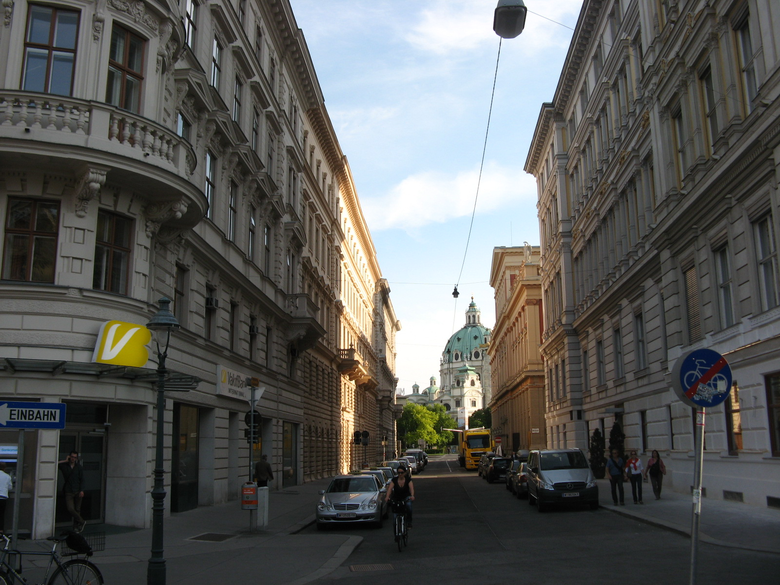 Canovagasse, Blick vom Ring zum Karlsplatz, Wien 1